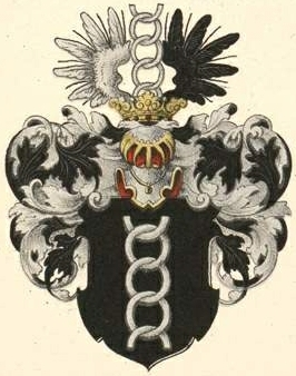 Schlippenbachi suguvõsa aadli- ja parunivapp